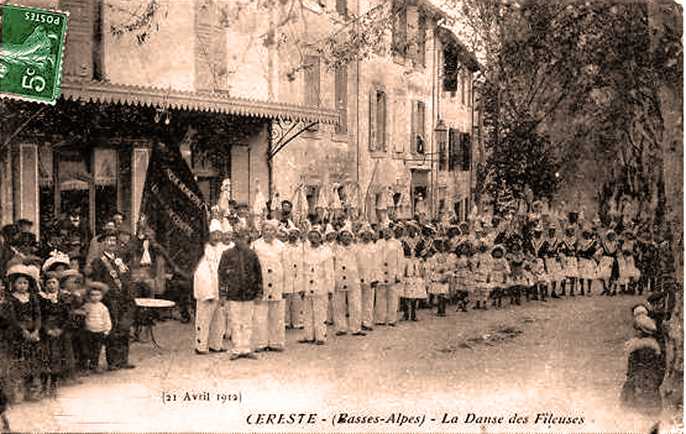 Céreste - La danse des fileuses.